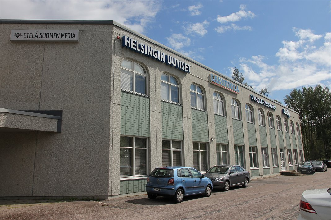 Etelä-Suomen Media Oy:n toimitalo Rälssitie 7:ssä Vantaan Veromiehen kaupunginosassa. Talossa työskentelee usean kaupunkilehden (Helsingin Uutiset, Länsiväylä, Vantaan Sanomat) toimitus tai osa niistä. Kaikkiaan Keskisuomalainen Oyj -mediakonserniin kuuluva Etelä-Suomen Media julkaisee usean toimipisteensä välityksellä noin 18 sanoma- ja kaupunkilehteä, 17 asiakaslehteä ja neljää ammattilehteä.